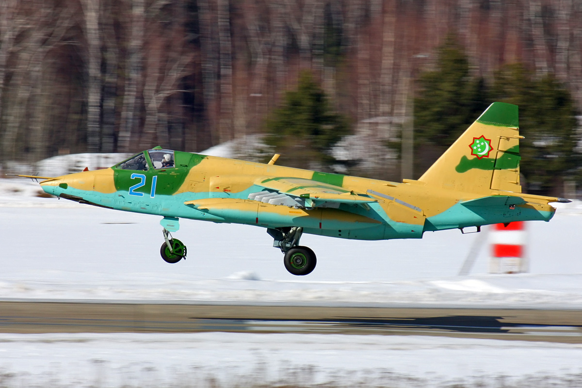 Su-25 Turmenistan AF